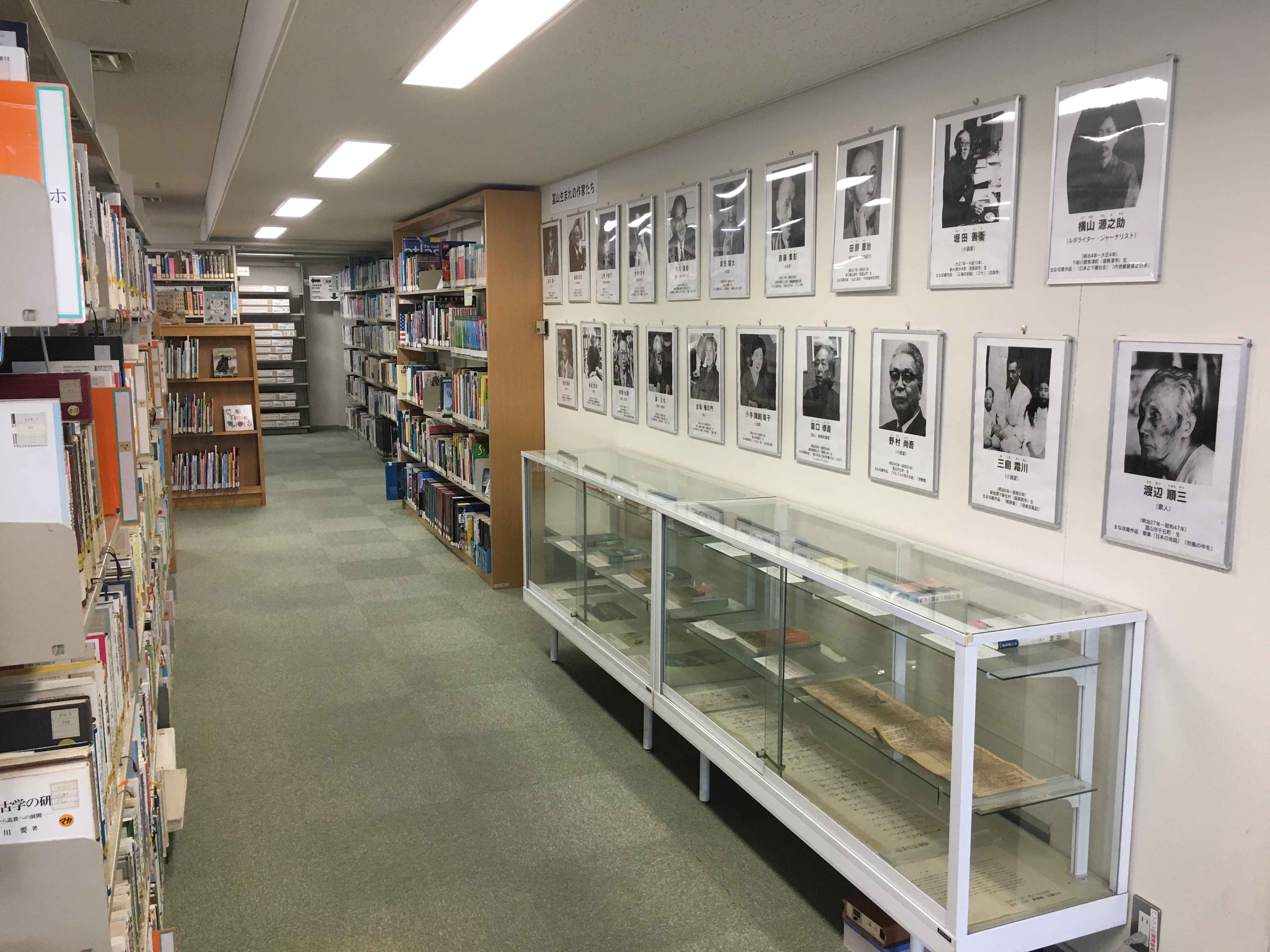 富山県立図書館県人文庫